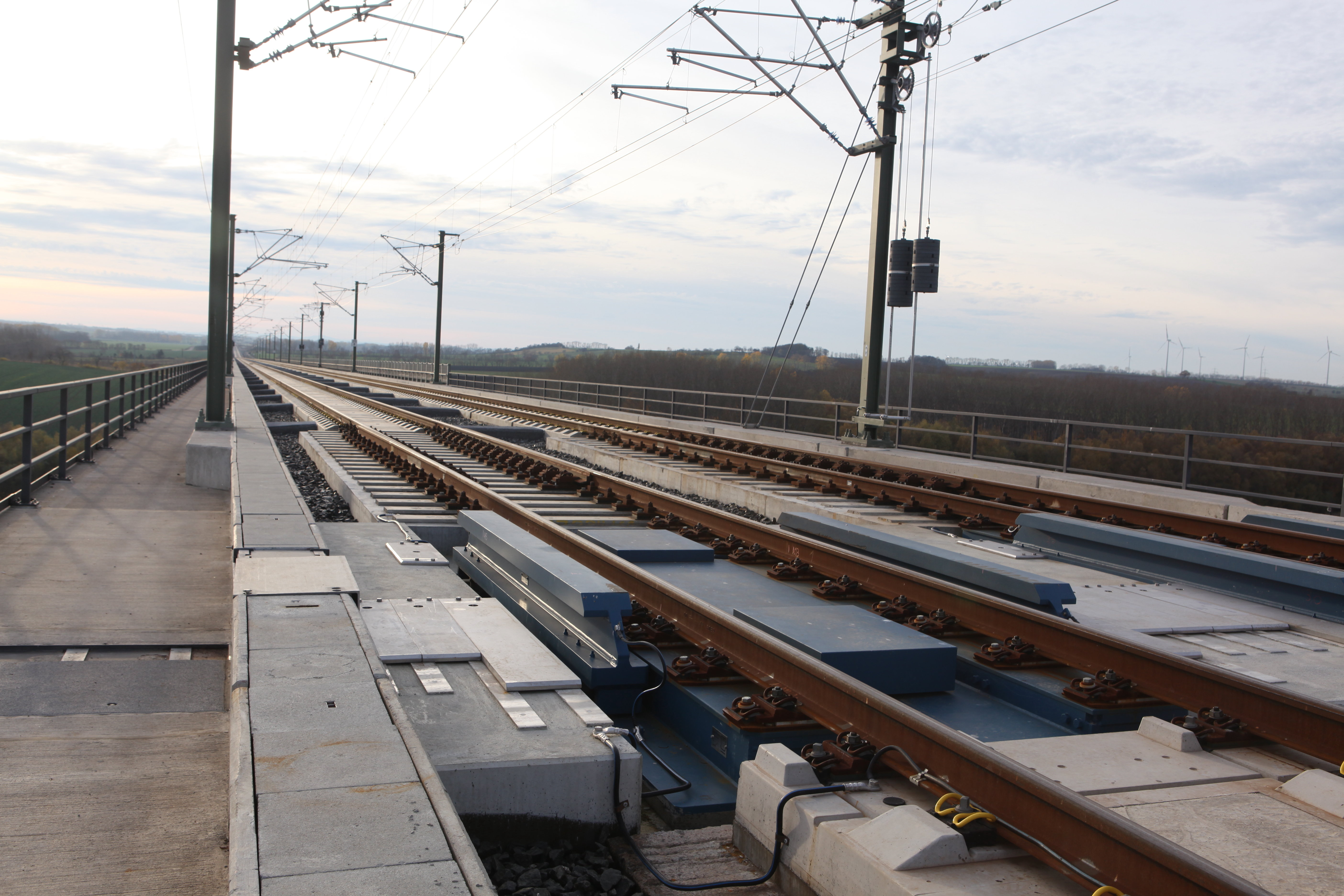 Scherkondetalbrücke